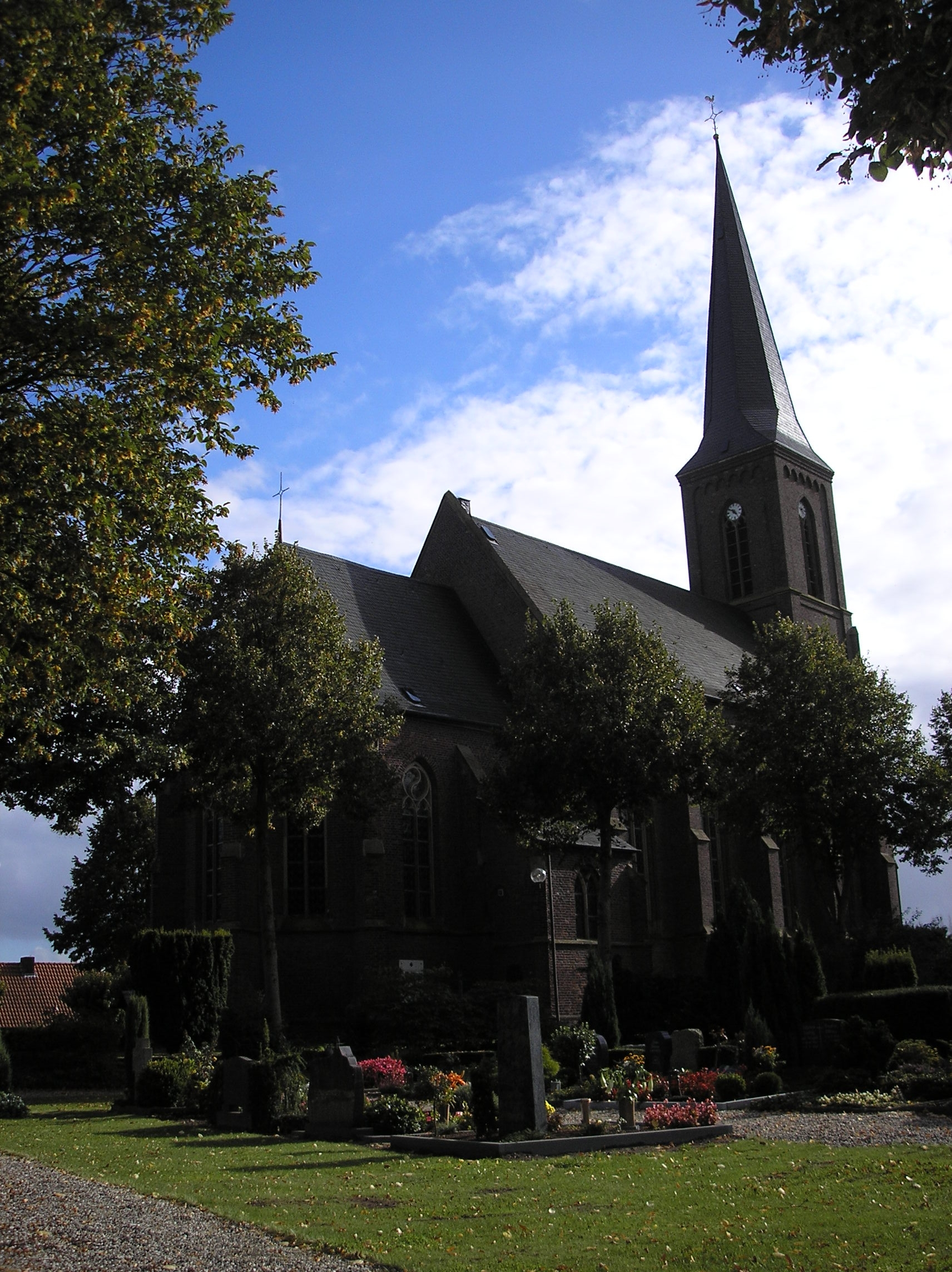 Kirche St. Martinus in Qualburg, Gemeinde Bedburg-Hau